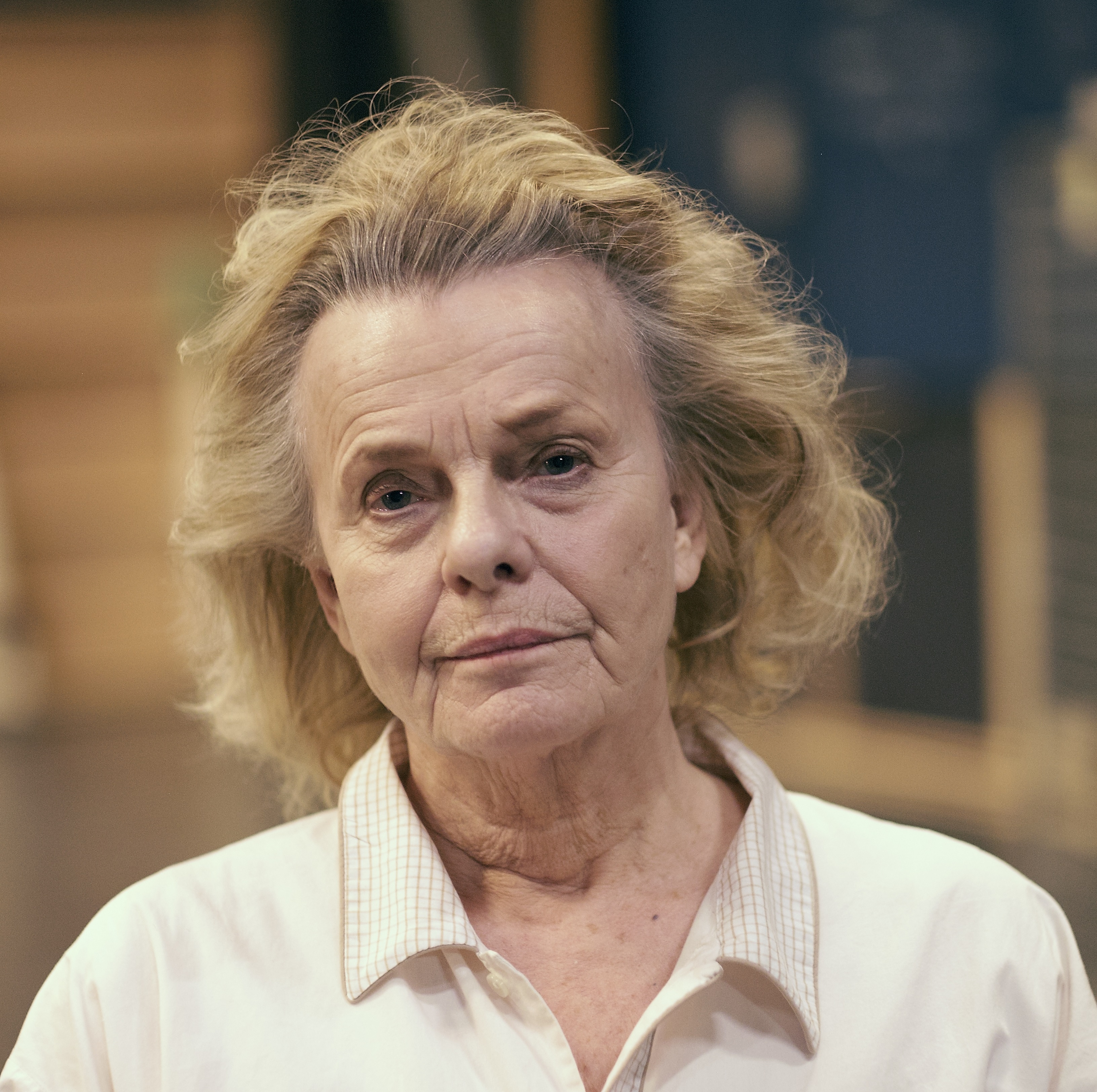 Skådespelerskan Marie Göranzon.